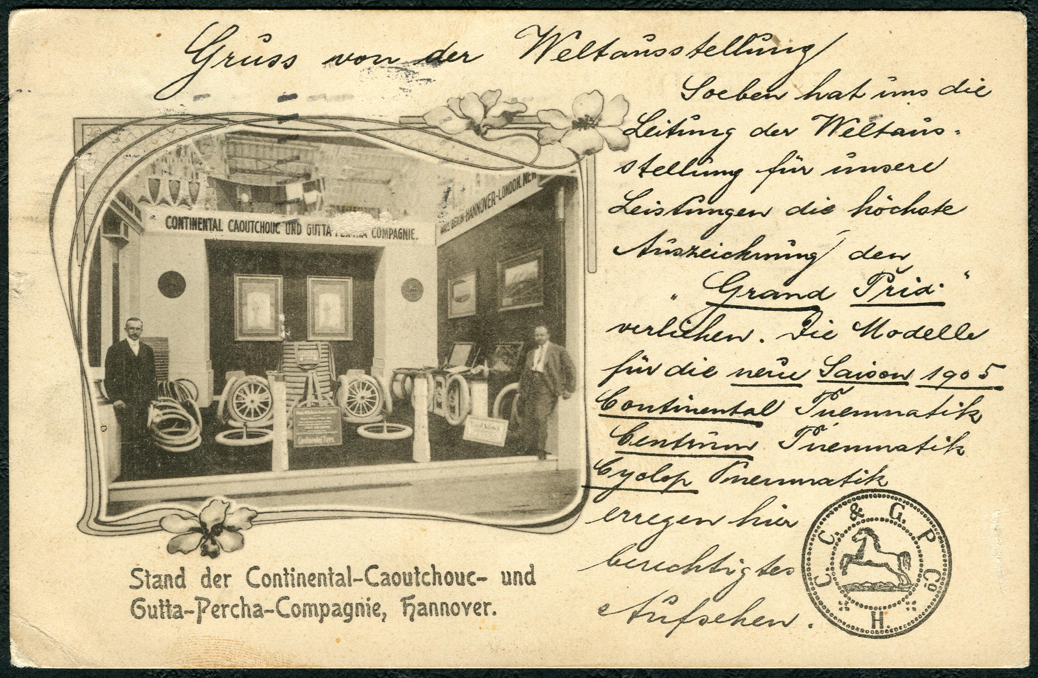 Mit einem "Gruß von der Weltausstellung" 1904 in Louisiana informierten Mitarbeiter vom "Stand der Continental-Caoutchouk- und Gutta-Percha-Companie, Hannover" (heute: Continental AG) den umseitigen Adressaten: "Soeben hat uns die Leitung der Weltausstellung für unsere Leistungen die höchste Auszeichnung, den Grand Prix verliehen. Die Modelle für die neue Saison 1905 Continental Pneumatik Centrum Pneumatik Cyclop Pneumatik erregen hier besichtigtes Aufsehen."